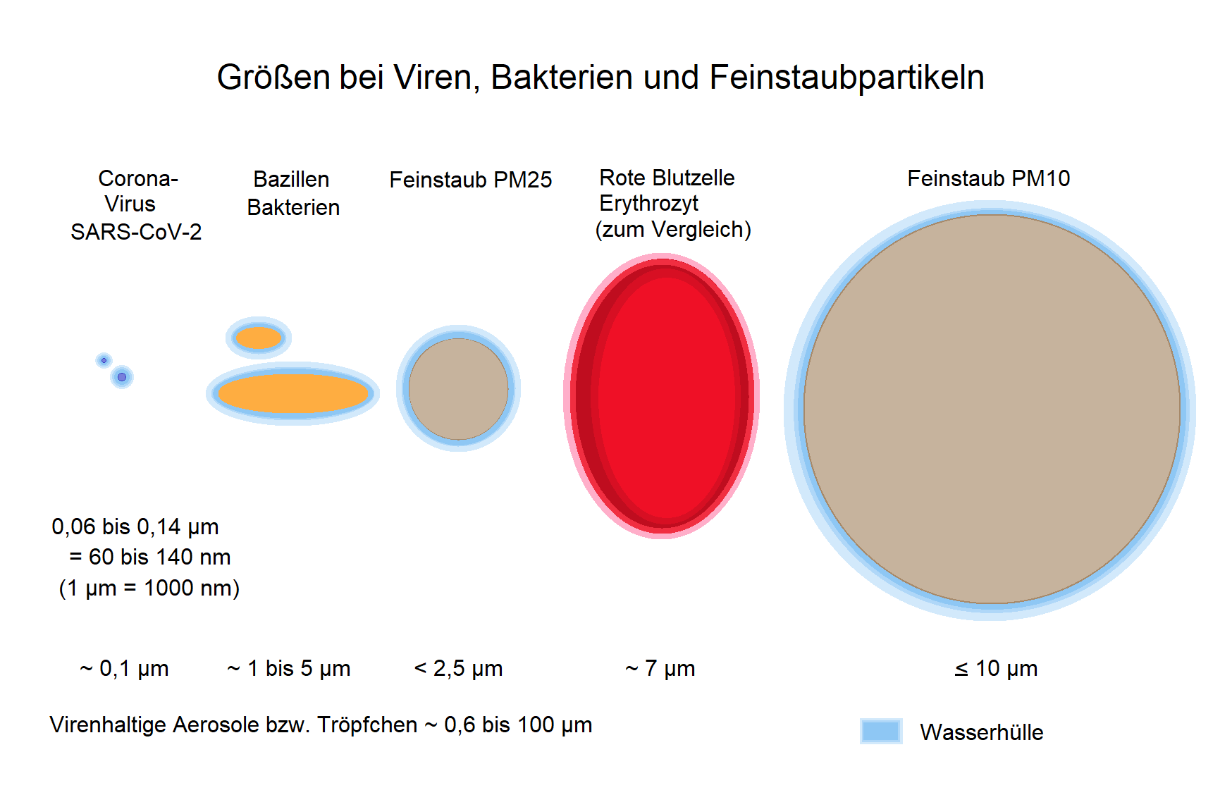 Beispiele für Größenordnungen bei Viren, Bakterien und Feinstaubpartikeln